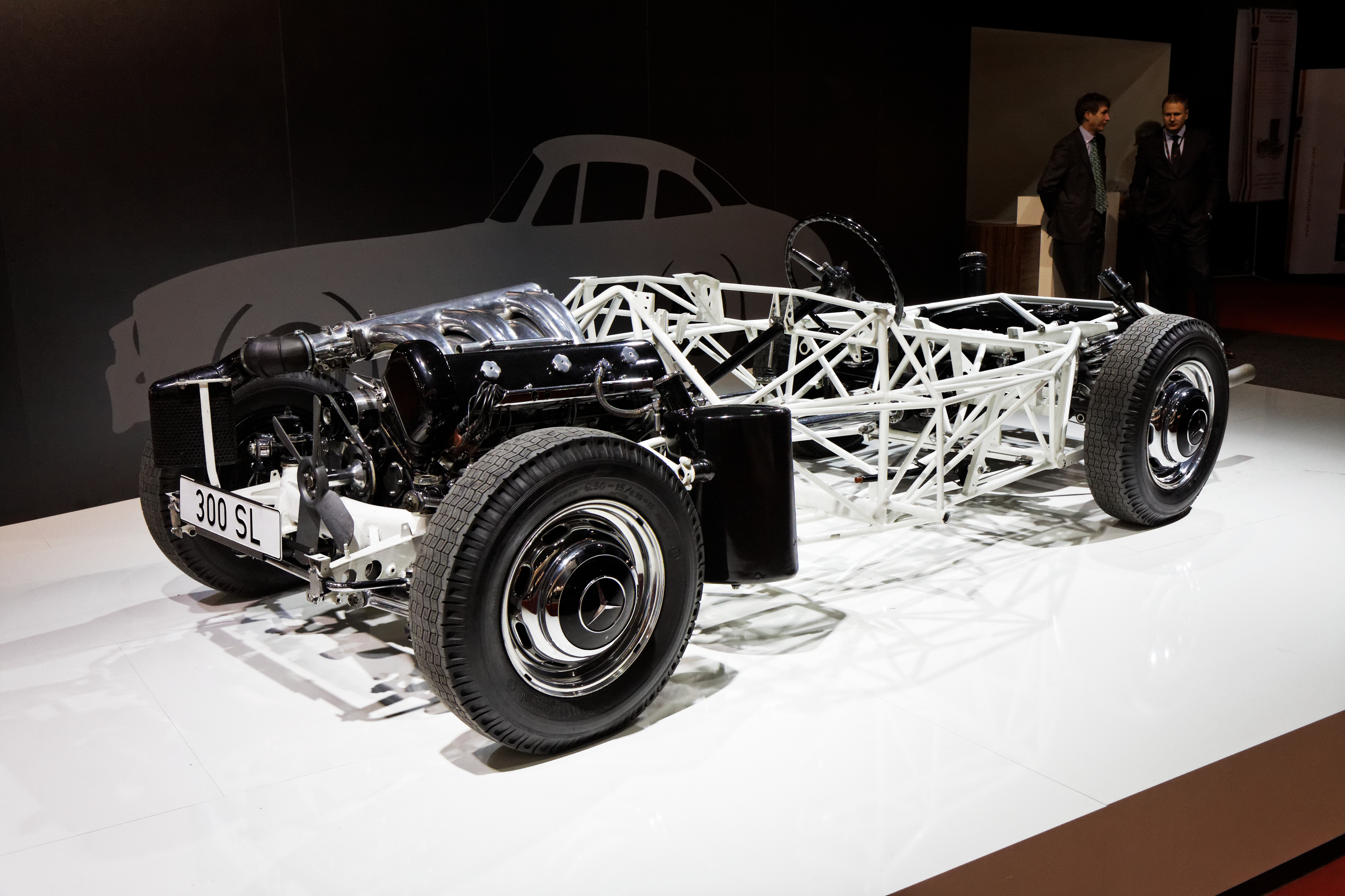 Le chassis d'une Mercedes-Benz 300 SL coupé présentée lors du salon retromobile 2013.